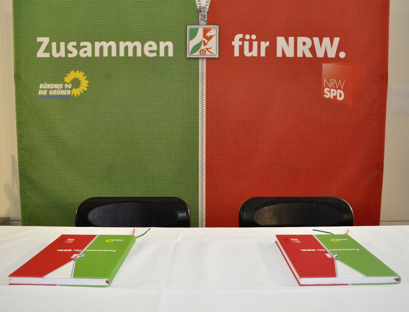 Ort der Vertragsunterzeichnung für die rot-grüne Landesregierung Nordrhein-Westfalens unter Ministerpräsidentin Hannelore Kraft